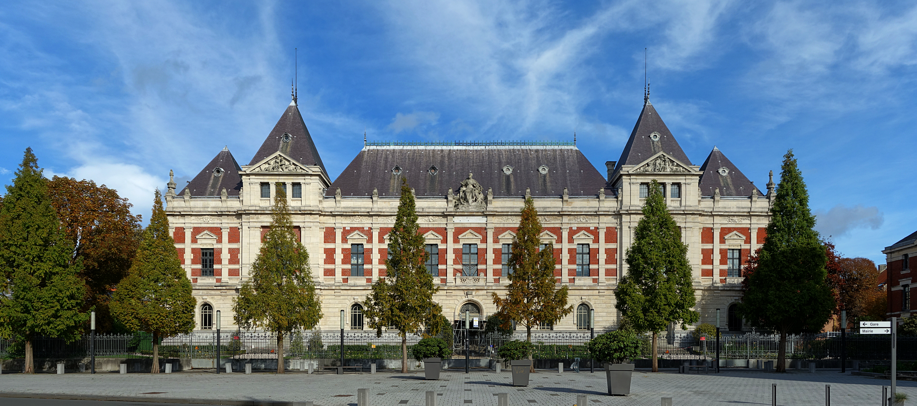 L'ENSAIT à Roubaix.